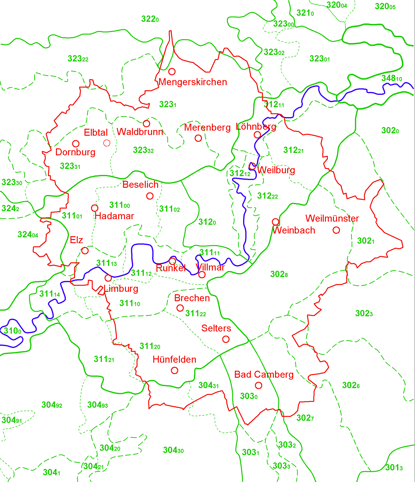 Naturräume im Limburger Raum, selbst erstellt nach Feuerstein, B.: Die Naturräume unseres Landkreises. Jahrbuch 2005 für den Kreis Limburg-Weilburg, Kreisausschuss des Landkreises Limburg, Weilburg, 2004, S. 251. Feldfrei at German Wikipedia ist Autor des zitierten Artikels. Weitere Literatur: Fischer, H.: Die naturräumlichen Einheiten auf Blatt 124 Siegen. - Bonn-Bad Godesberg, 1972. Müller-Miny, H. und M. Bürgener: Die naturräumlichen Einheiten auf Blatt 138 Koblenz. - Bonn-Bad Godesberg, 1971. Sandner, G.: Die naturräumlichen Einheiten auf Blatt 125 Marburg. - Bad Godesberg, 1960. Schwenzer, B.: Die naturräumlichen Einheiten auf Blatt 139 Frankfurt am Main. - Bad Godesberg, 1967.